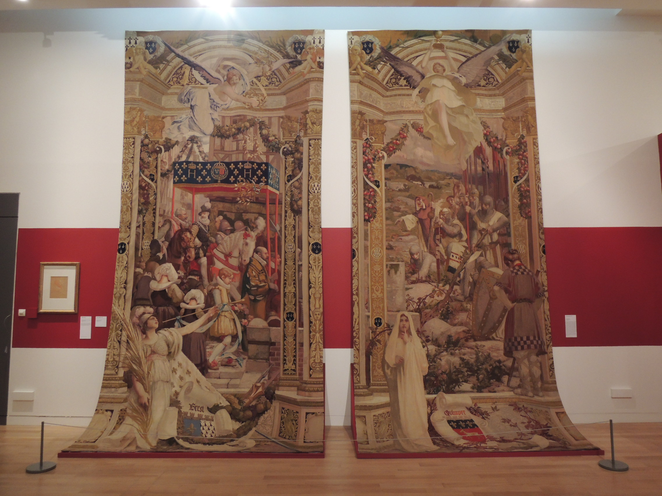 Tapisseries Entrée d'Henri IV à Rennes et Alain Barbe-Torte